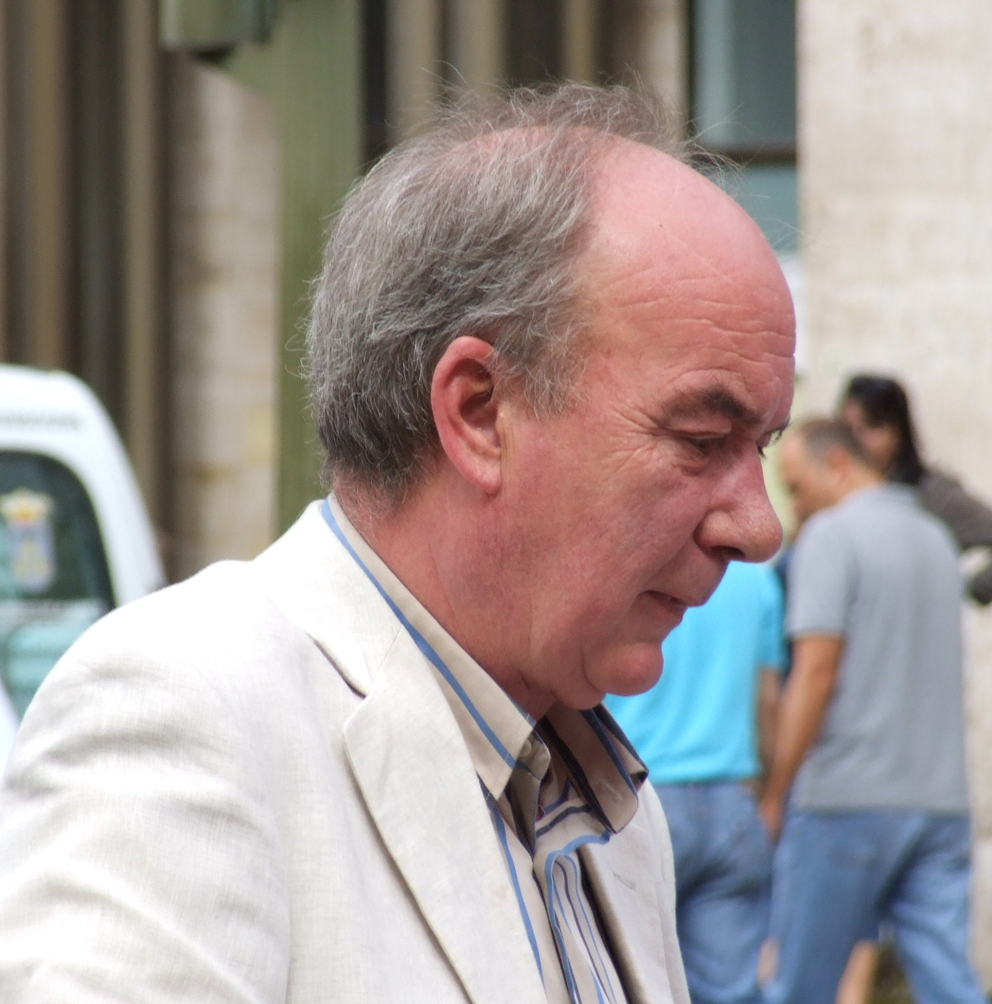 Manuel Pérez Castell, Alcalde de Albacete (1999-)